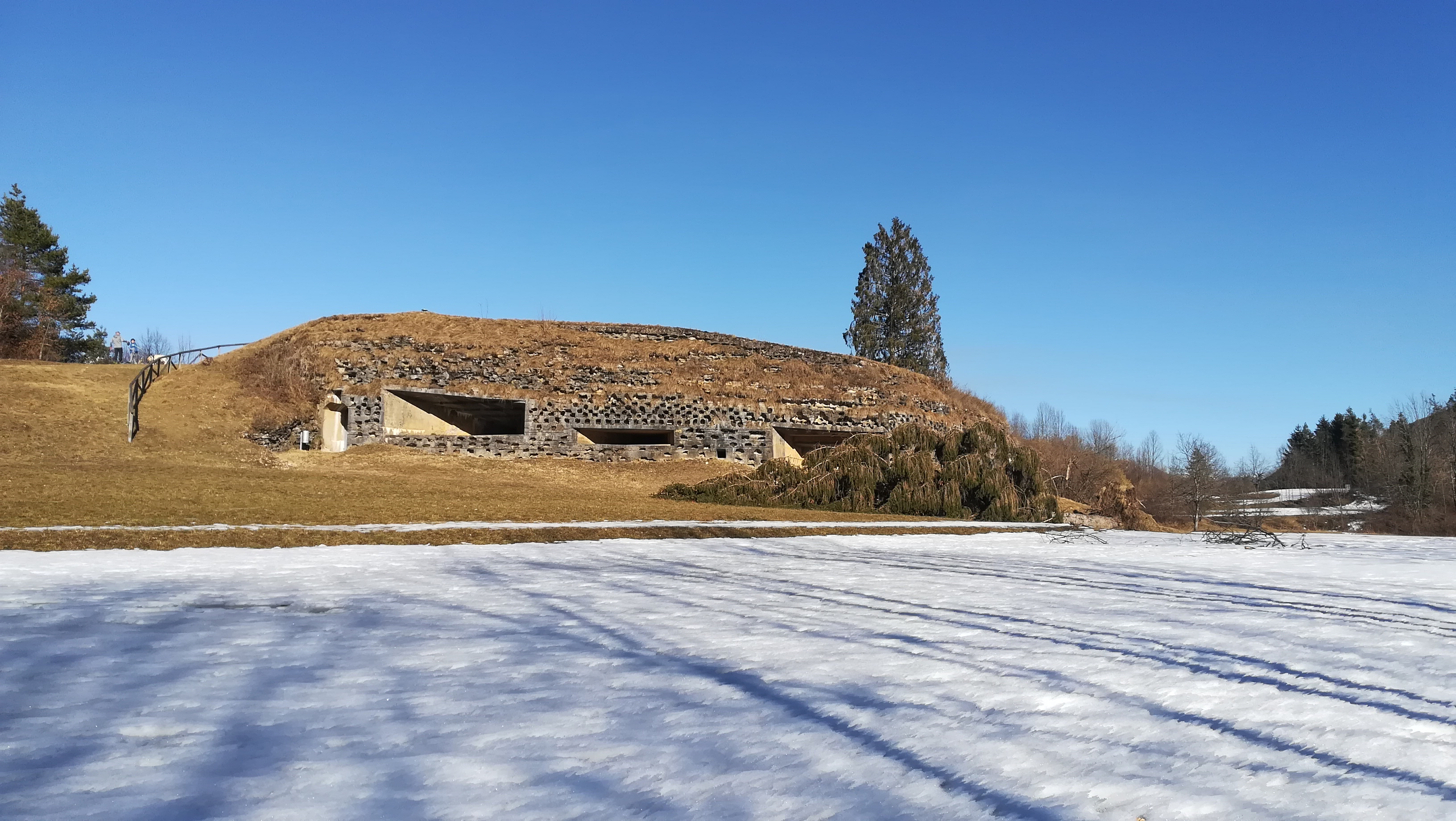 Lo sbarramento n°1